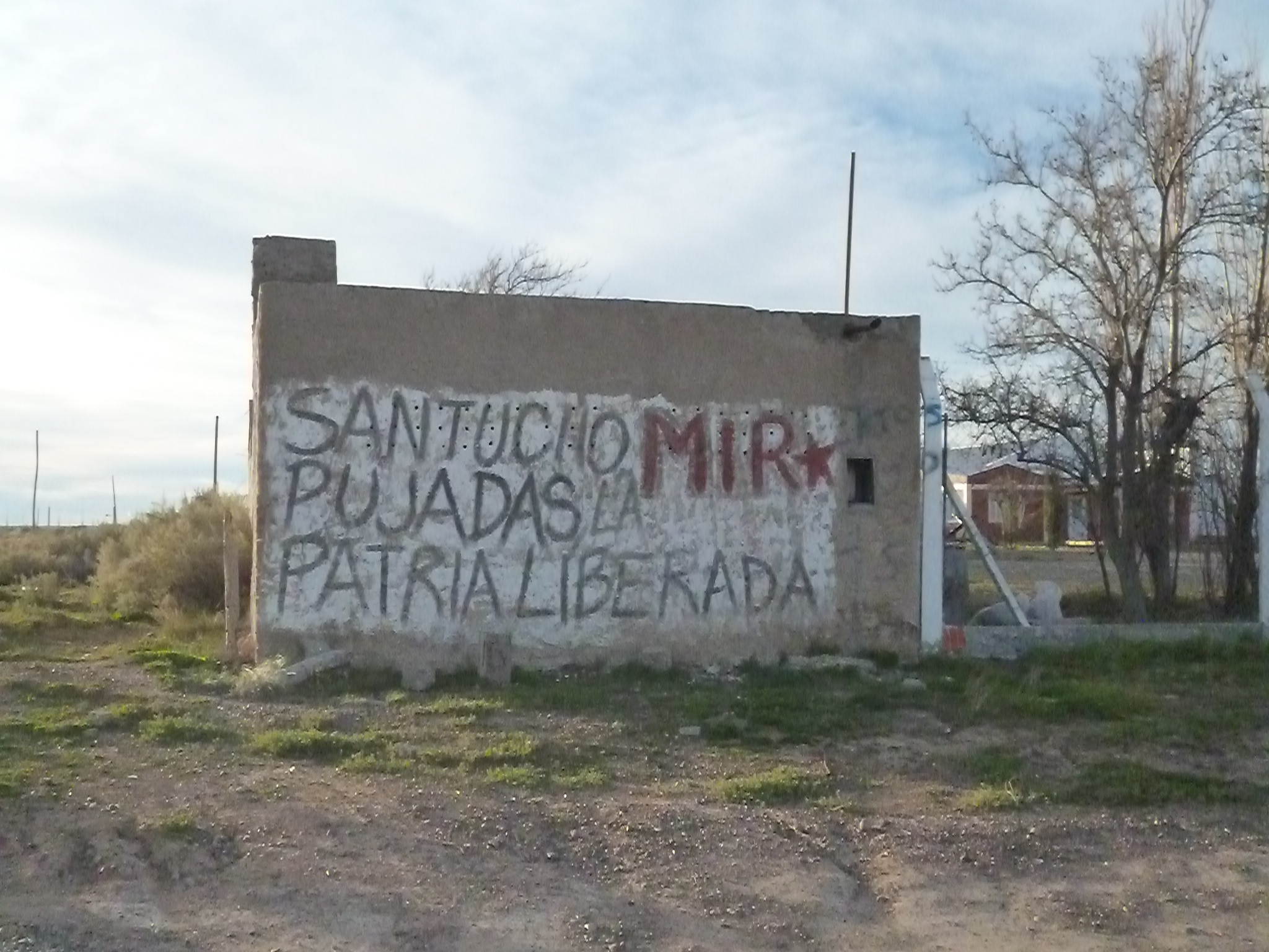 Aeropuerto Viejo de Trelew, actual Centro Cultural por la Memoria. Funcionó como terminal aérea entre 1938 y 1979, cuando fue reubicado. El 15 de agosto de 1972, 110 prisioneros políticos se fugaron del penal de Rawson y tomaron un BAC 1-11 de Austral que se dirigía a Buenos Aires, para dirigirse primero a Chile y después a Cuba. Los planes fallaron y 19 de ellos, que no lograron escaparse, decidieron tomar el edificio. Una patrulla militar bajo las órdenes del capitán de corbeta Luis Emilio Sosa, condujo a los prisioneros recapturados a la Base Aeronaval Almirante Zar. Allí fueron fusilados el 22 de agosto, en lo que se conoce como "Masacre de Trelew".